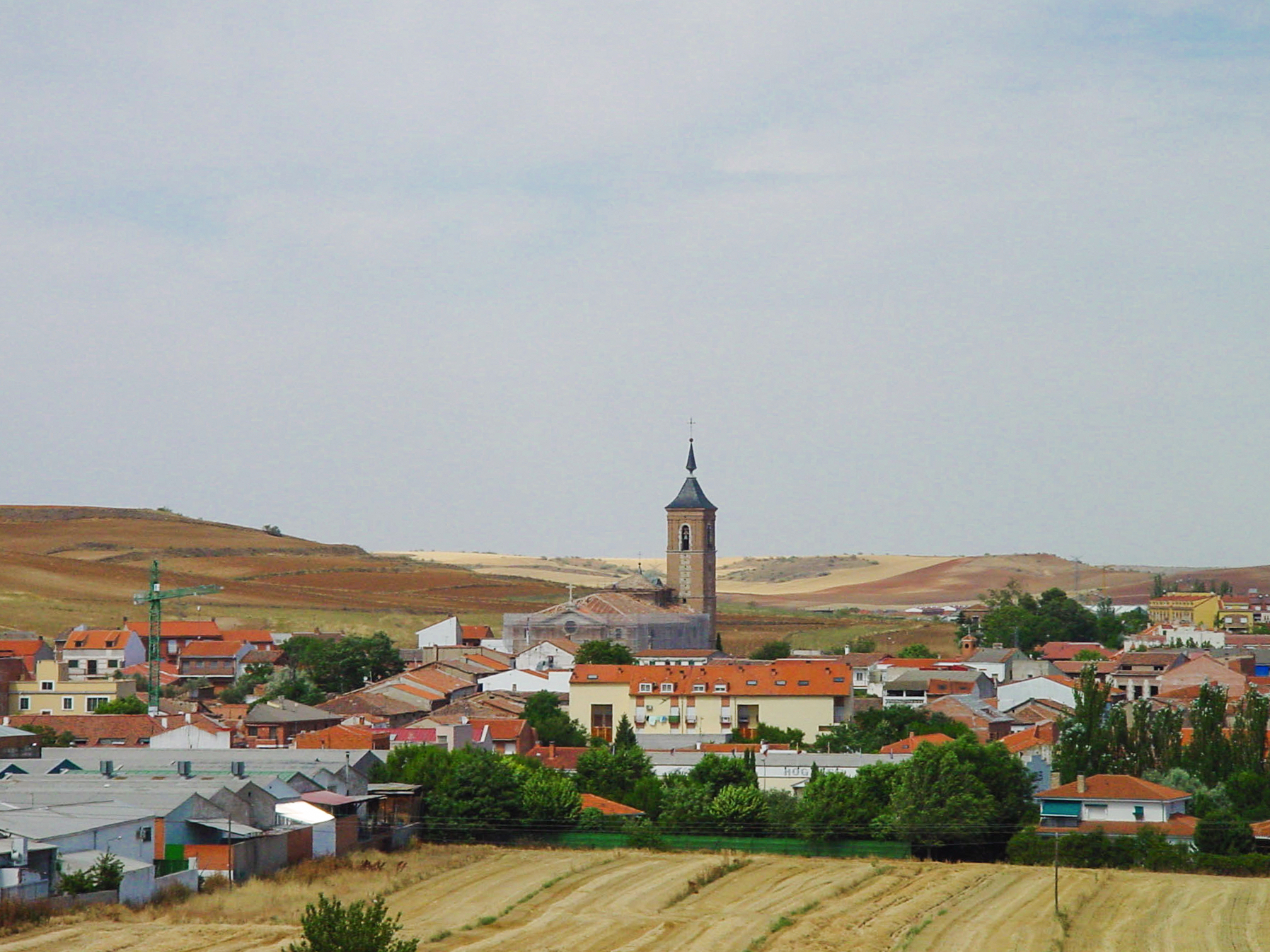 Vista panorámica de Ajalvir.